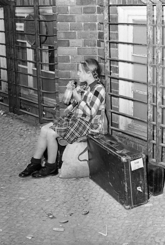 August 1952 Meldestelle des Westberliners Senat für Ostflüchtlinge in der Kuno-Fischer-Straße.